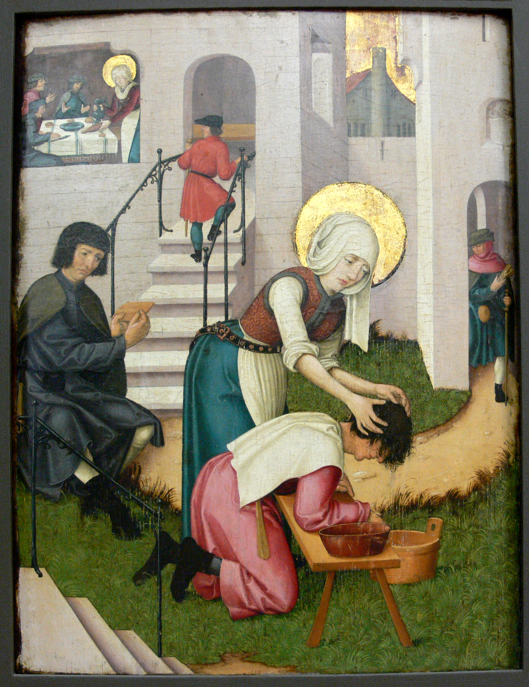 Barmherzigkeit der Hl. Verena von Zurzach